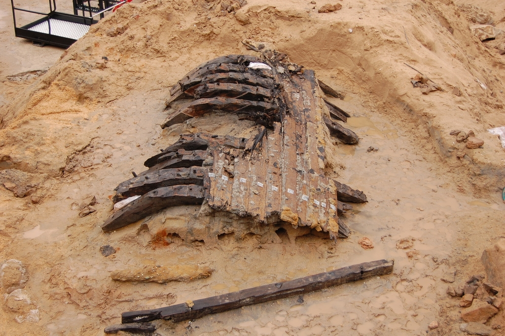 Restes de la nau Barceloneta I durant la seva excavació. Foto: Mikel Soberón